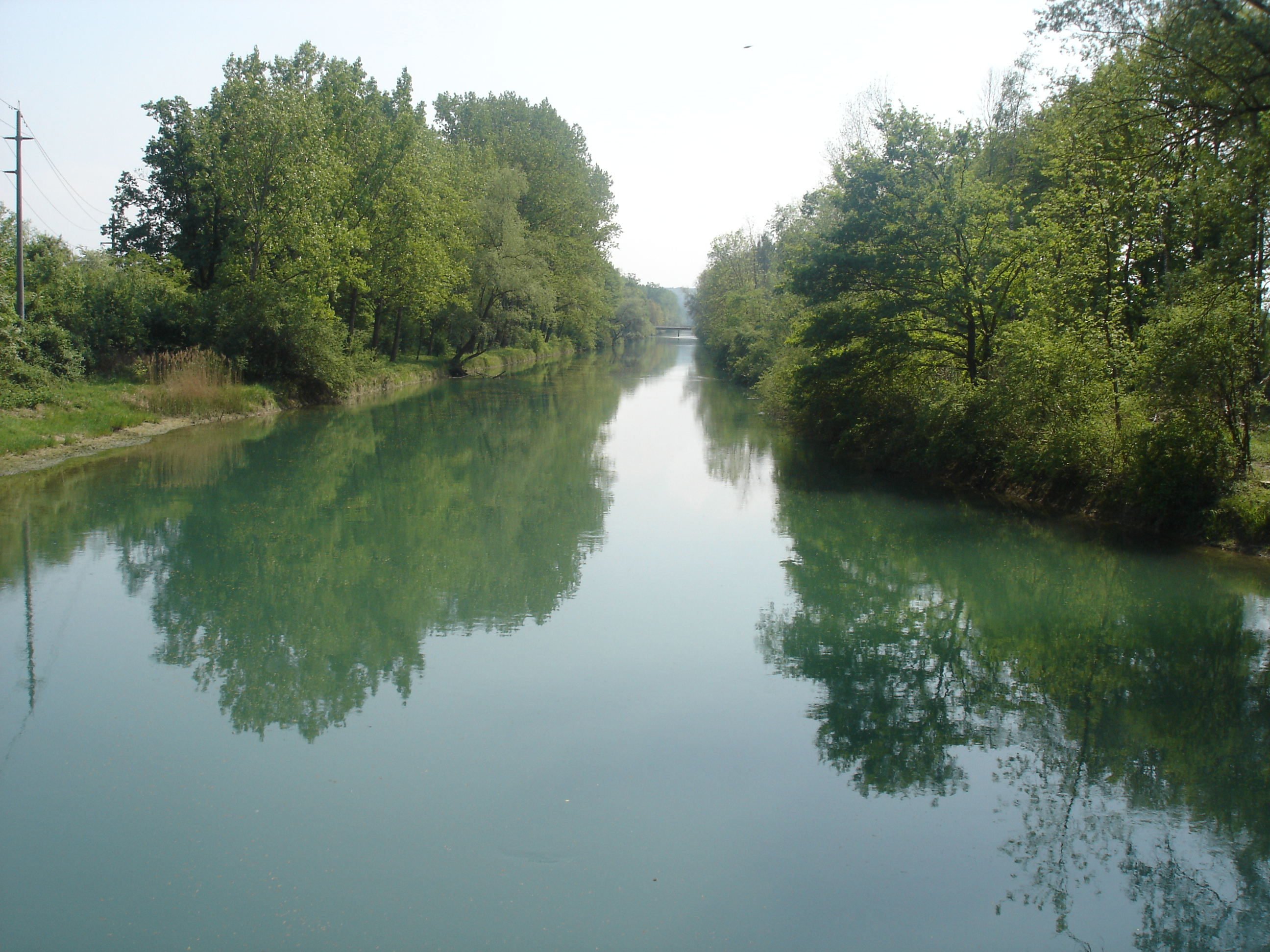 Unterwasserkanal des Kraftwerkes Kallnach, kurz vor der Einmündung in die Aare bei Walperswil